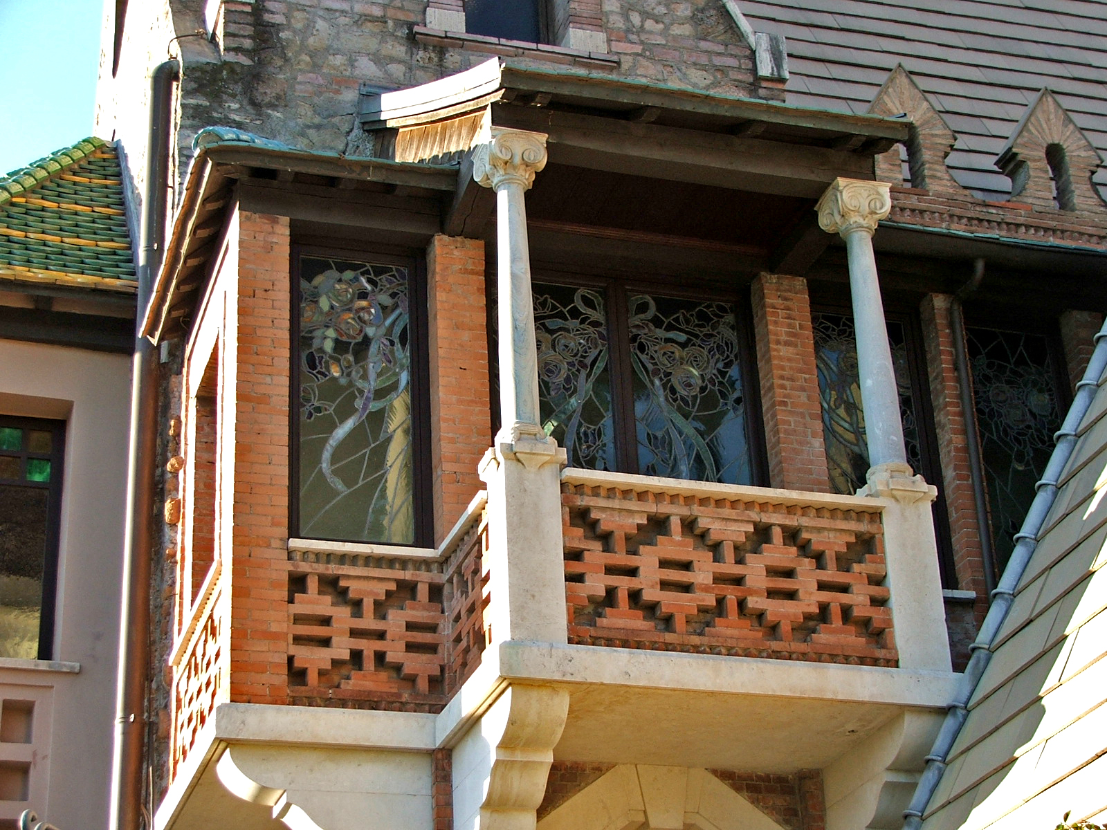 Casina delle Civette Museum, Rome.